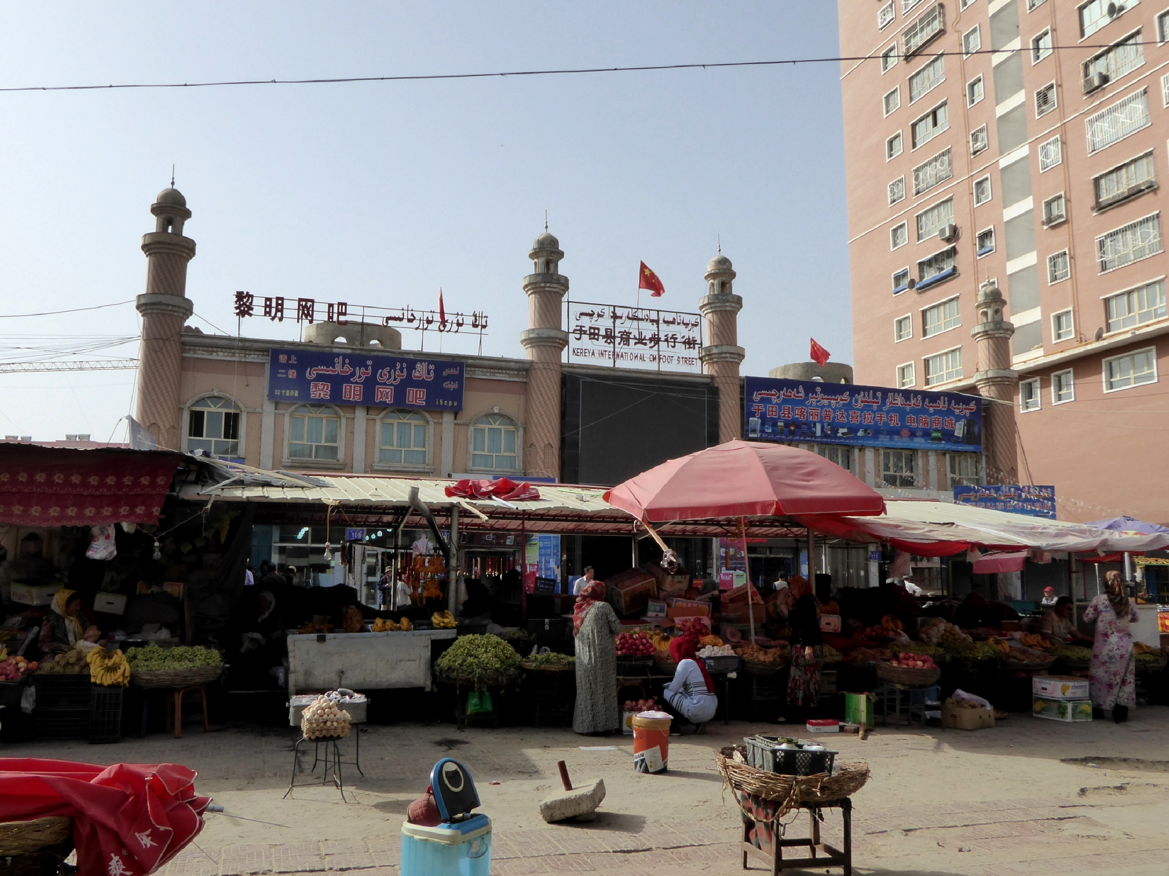 Keriya Hotan Xinjiang China 新疆 和田 于田